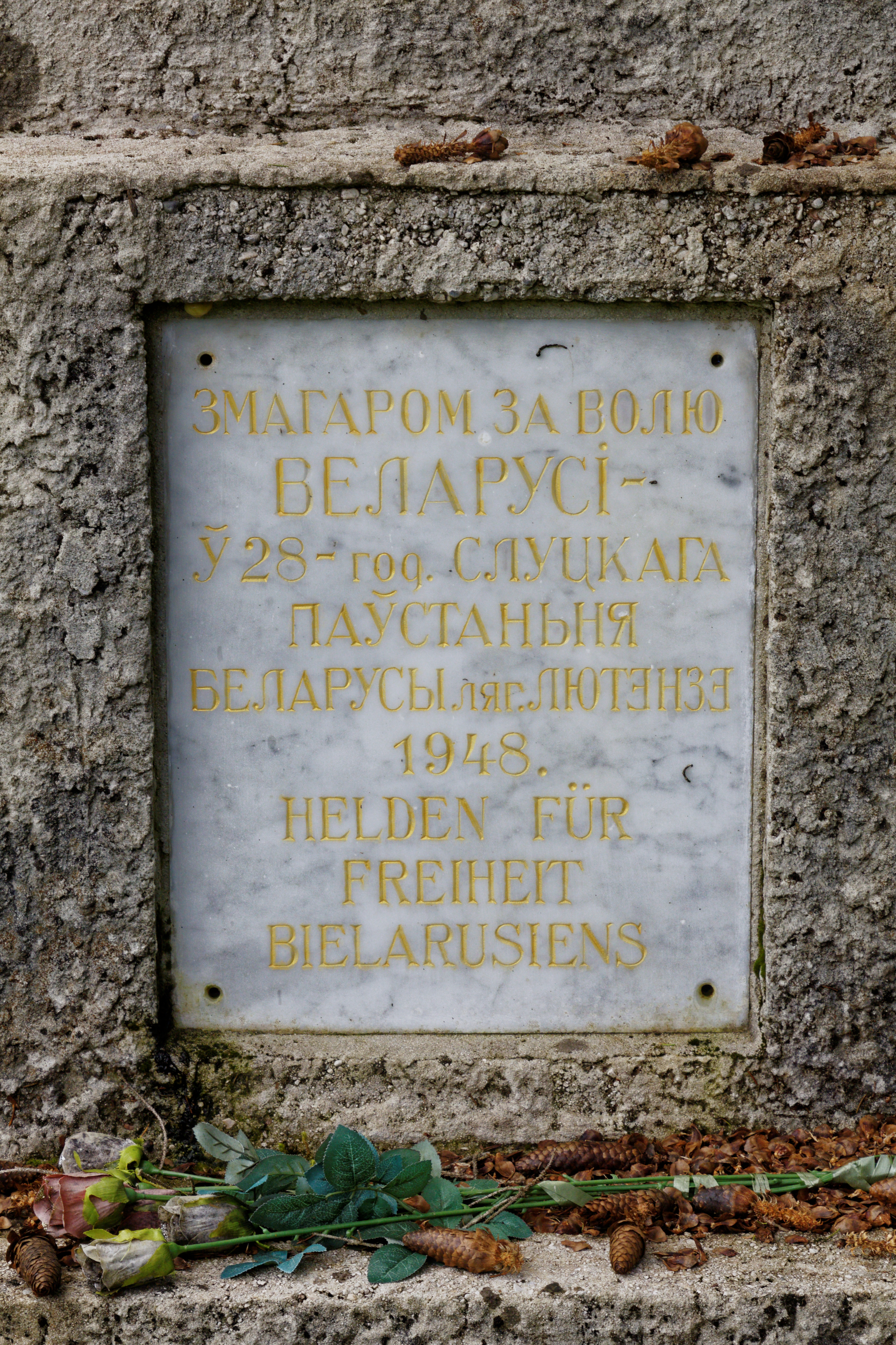 Mittenwald Luttenseekaserne; Denkmal weißrussischer Kriegsgefangener (Ausschnitt)This is a photograph of an architectural monument.